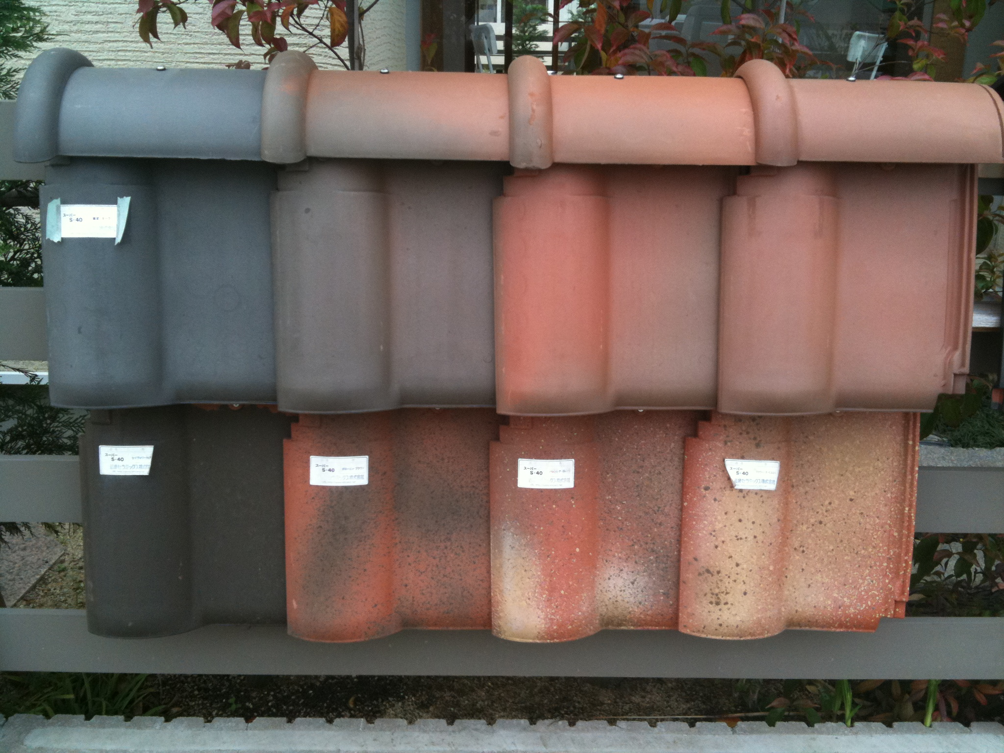 上段が本物の窯変瓦。下段が素焼き瓦に釉薬を散らして窯変瓦っぽくした偽物